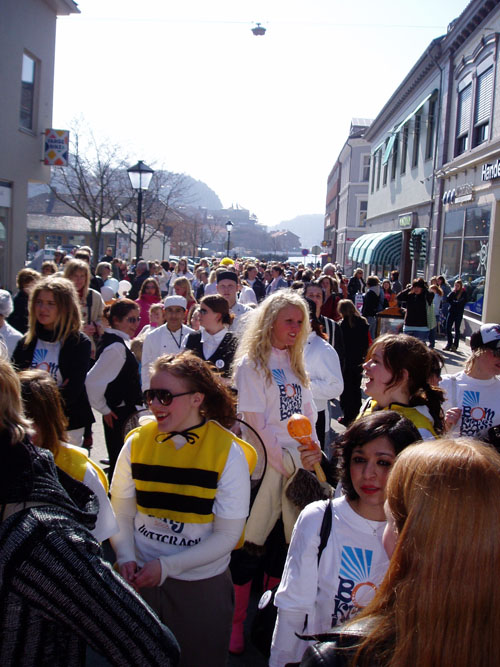 Parade under Bom Kræsj Bang 2005